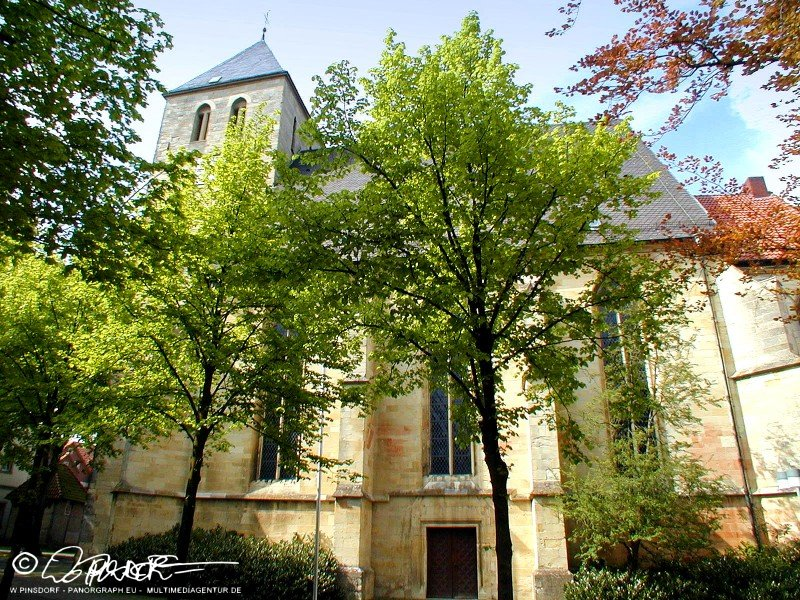 Kath. Pfarrkirche St. Dionysius Havixbeck